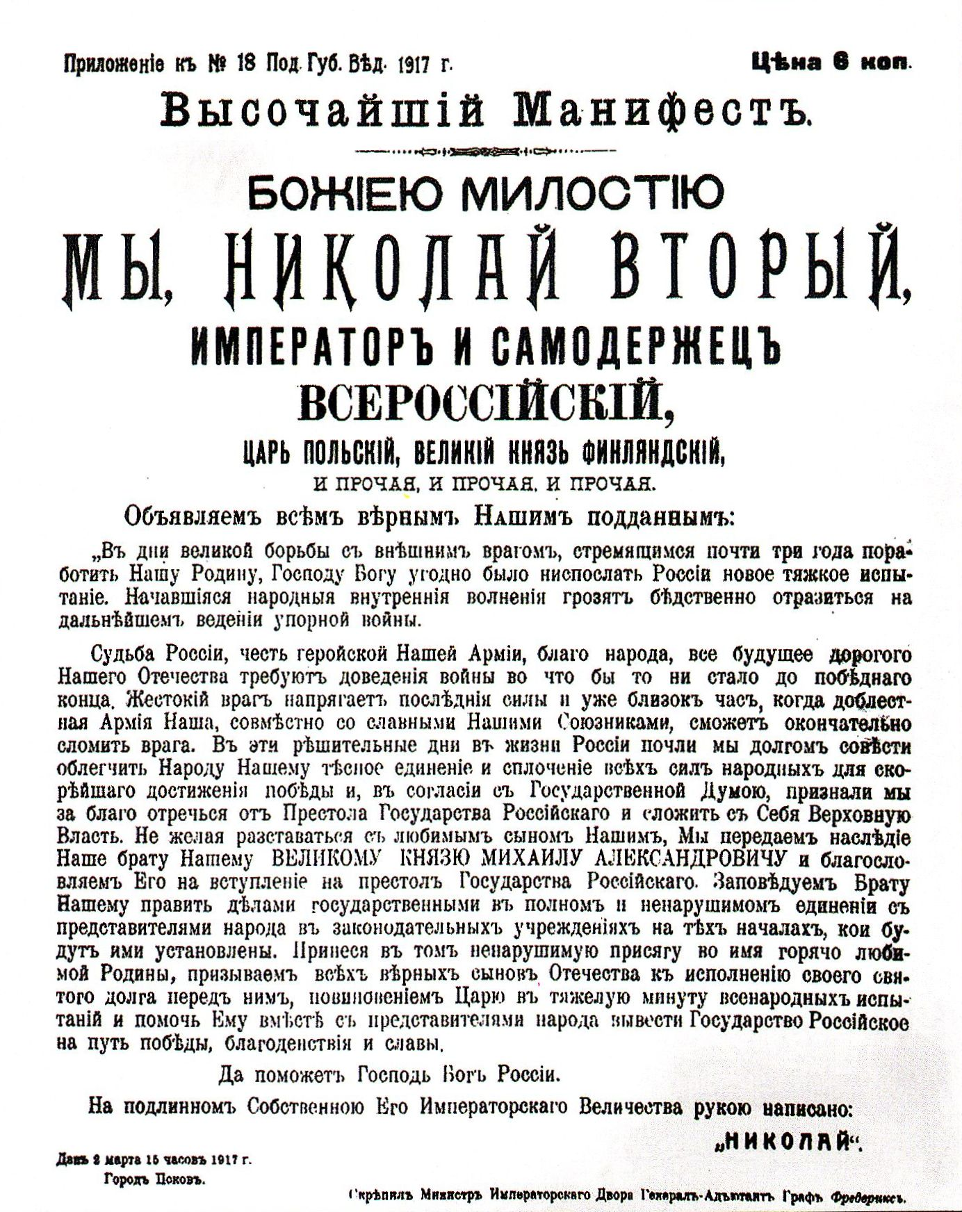 Отречение от престола "Божией милостью Императора и Самодержца Всероссийского" Николая II. Манифест. Приложение к "Подольским губернским ведомостям" № 18 от 1917 года. Цена манифеста 6 копеек. В документе указано место подписания - город Псков; на самом деле - станция Дно.